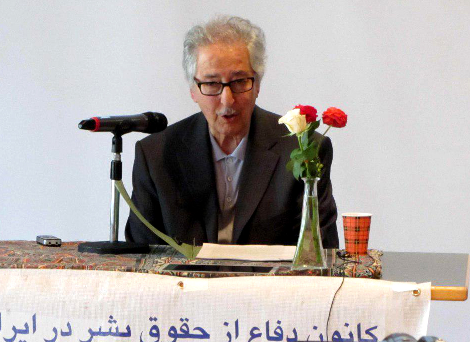 دکتر سید ابوالحسن بنی صدر